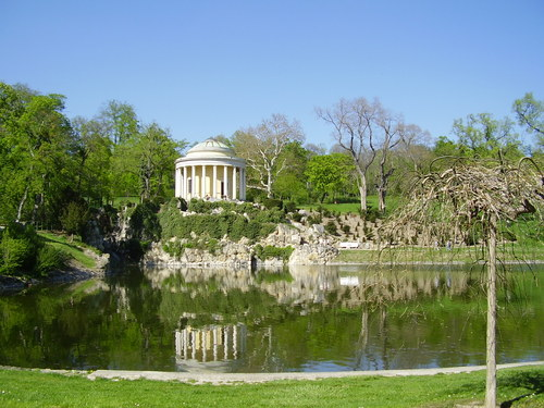 Schloßpark Esterházy